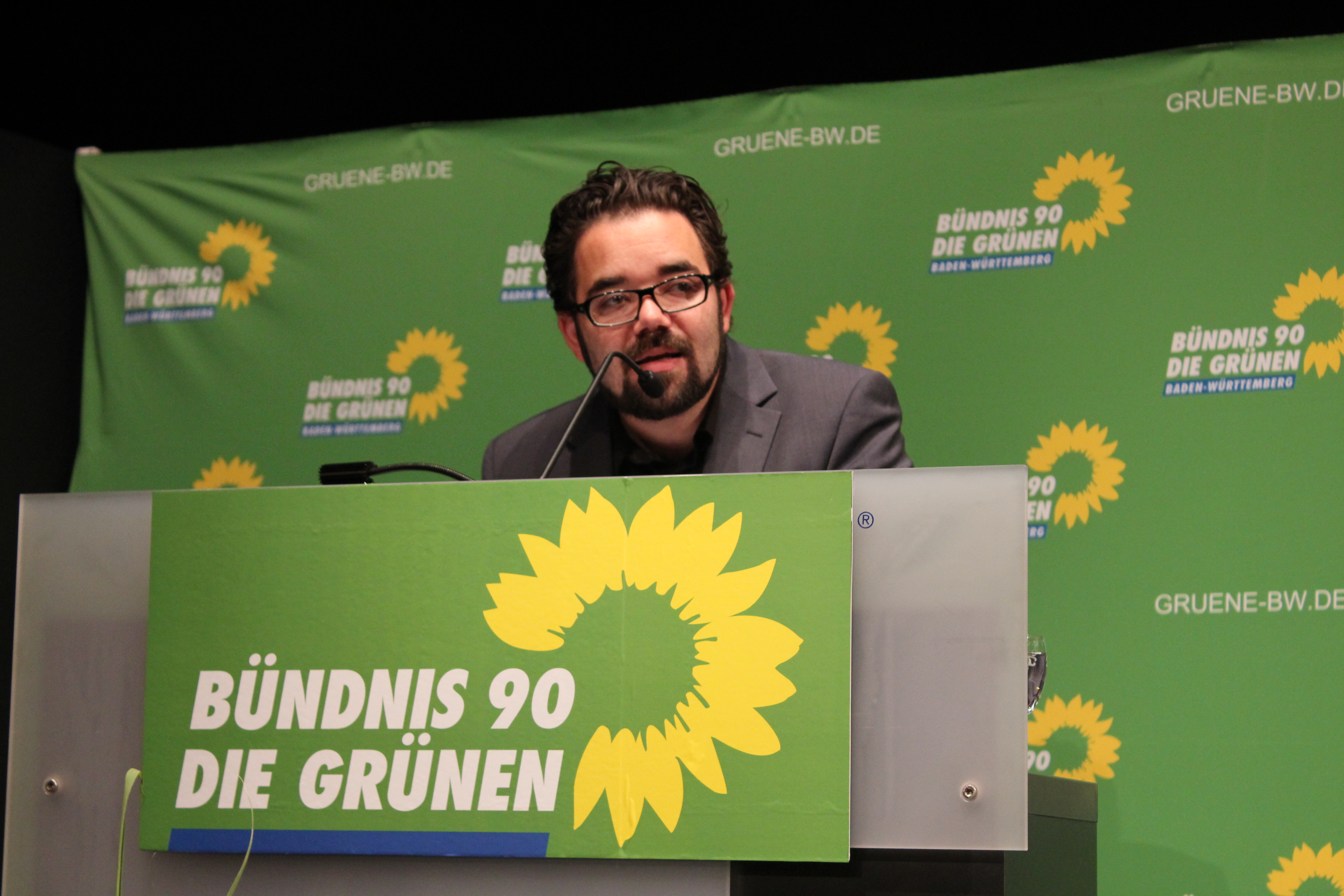 Der Landesvorsitzende der Grünen Baden-Württemberg, Chris Kühn, beim Landesausschuss in Heilbronn